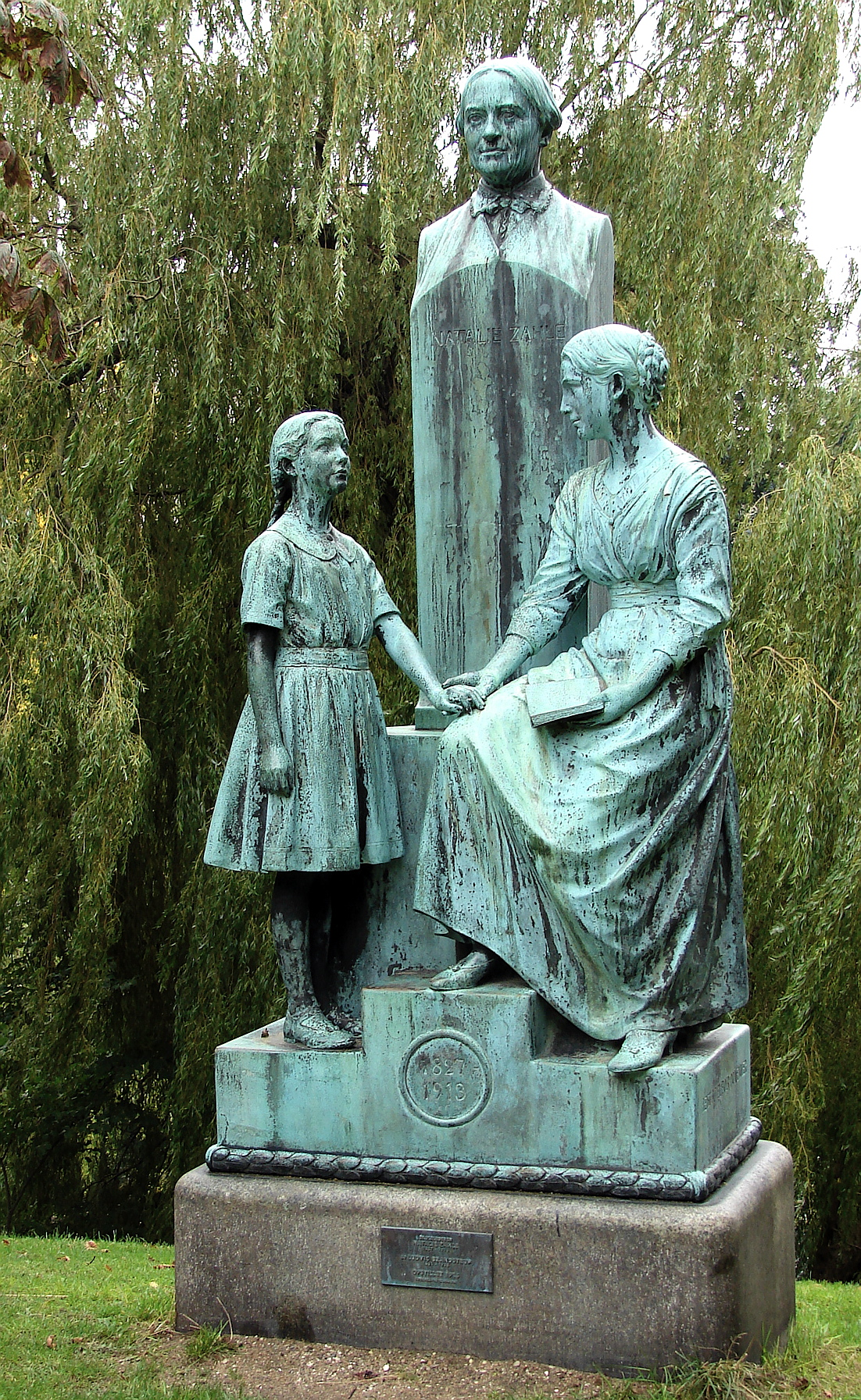 Skolelederen Natalie Zahle (1827-1913), Ludvig Brandstrup, opstillet 1916, Ørstedsparken, København